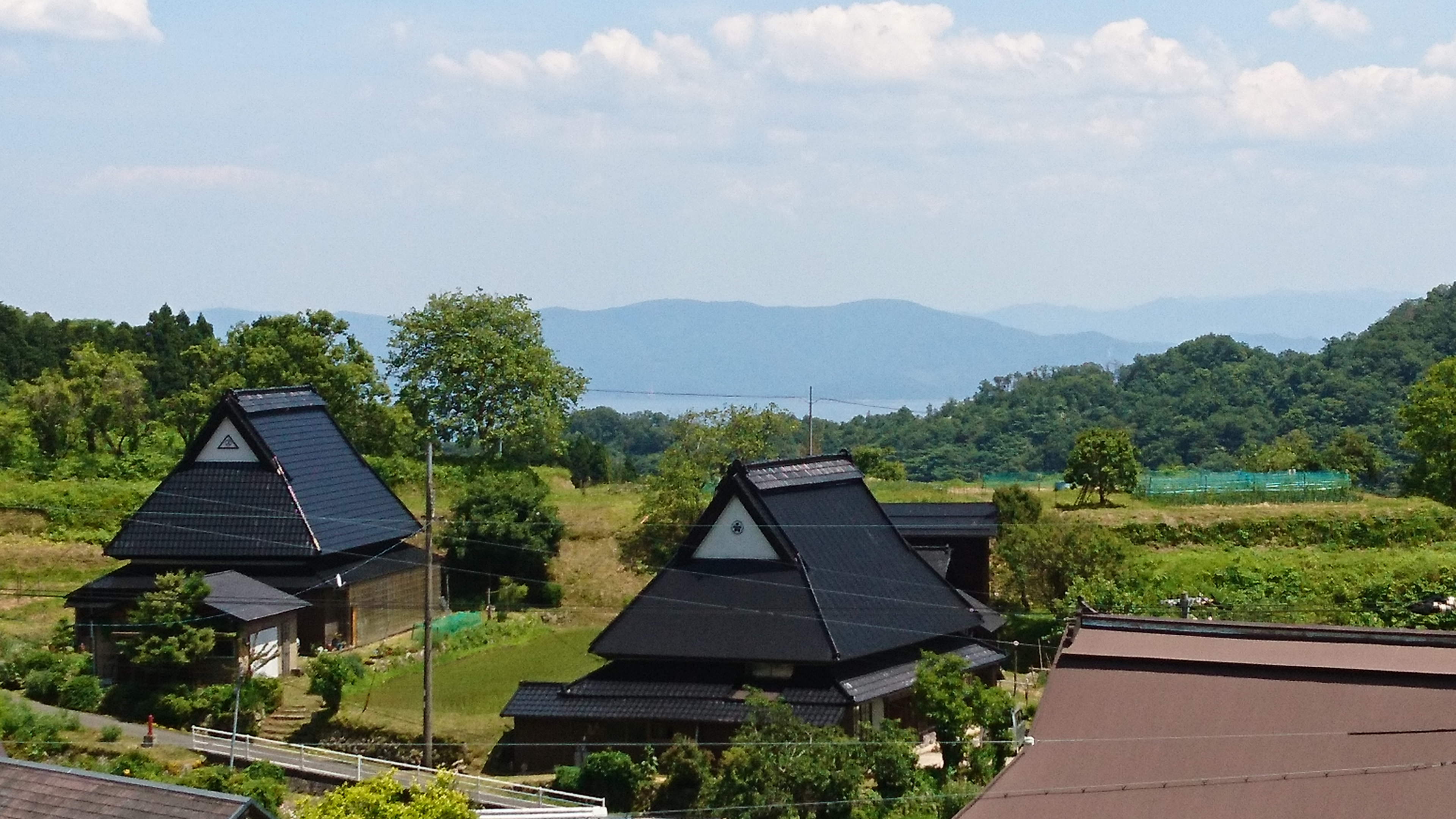 上世屋の藤織り伝承交流館から臨む、波見の海。